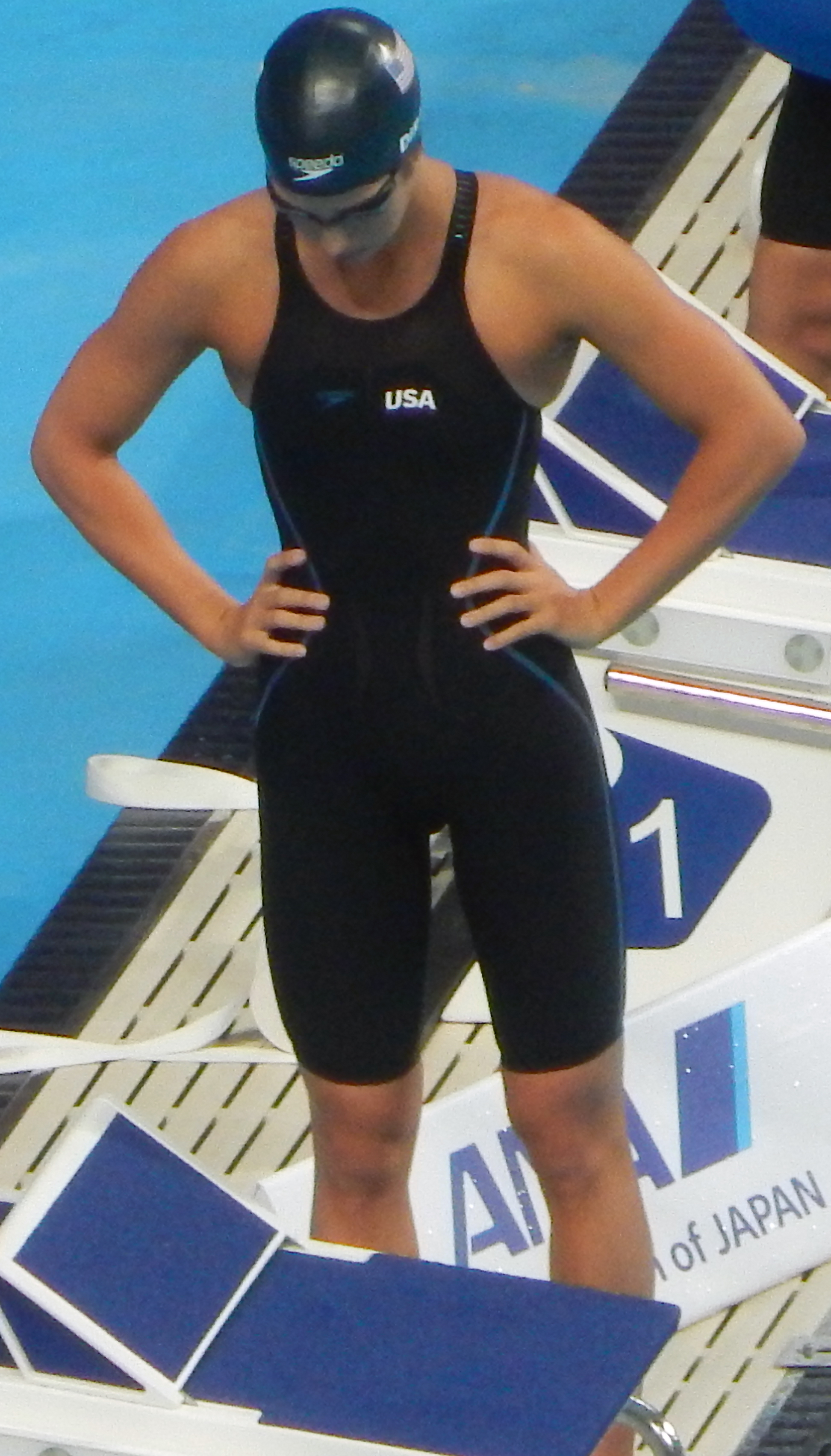 Майя диРадо на чемпионате мира в Казани